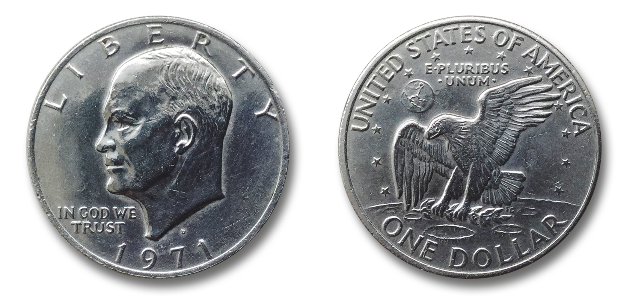 Vorder- und Rückseite des US-amerikanischen "Eisenhower-Dollars" von 1971